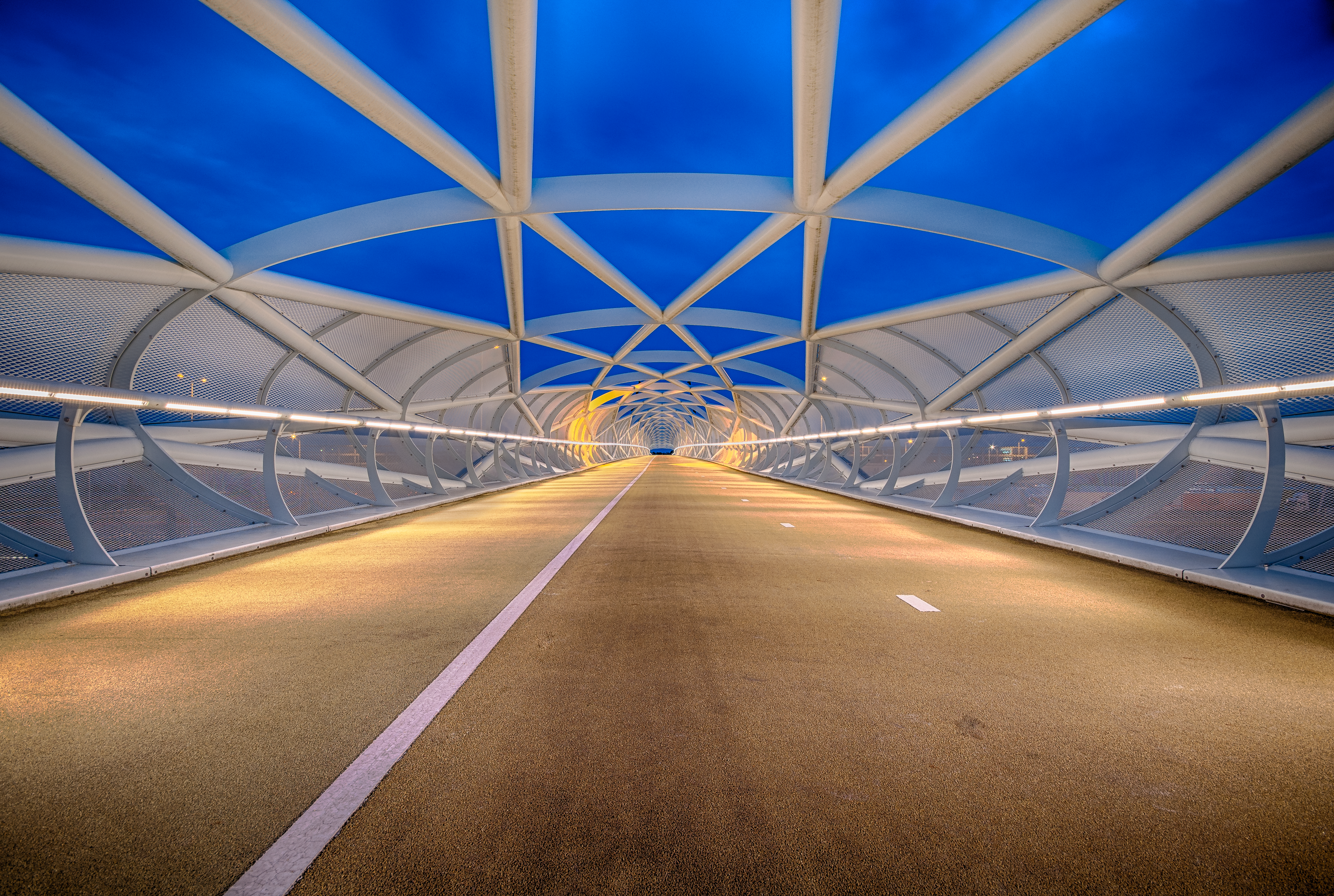 "De Groene Verbinding", oftewel "De Netkous"; de fietsbrug die Rotterdam-Zuid verbindt met Rhoon.